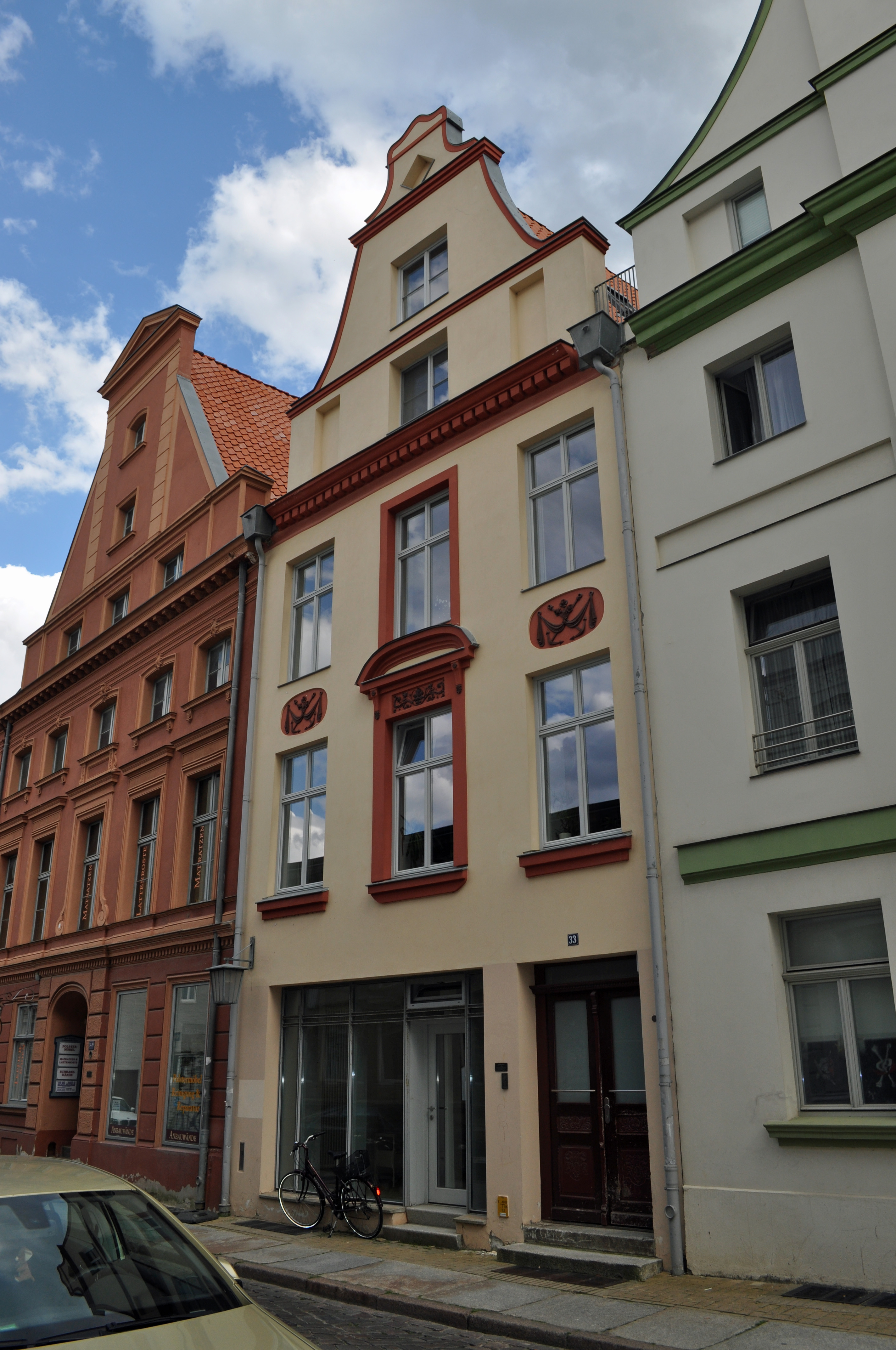 Das Foto zeigt ein Haus (bzw. Details des Hauses) in der Frankenstraße in Stralsund, Deutschland. Die Hausnummer steht im Dateinamen. Aufgenommen am 19. Juli 2011 vom Benutzer:Klugschnacker.